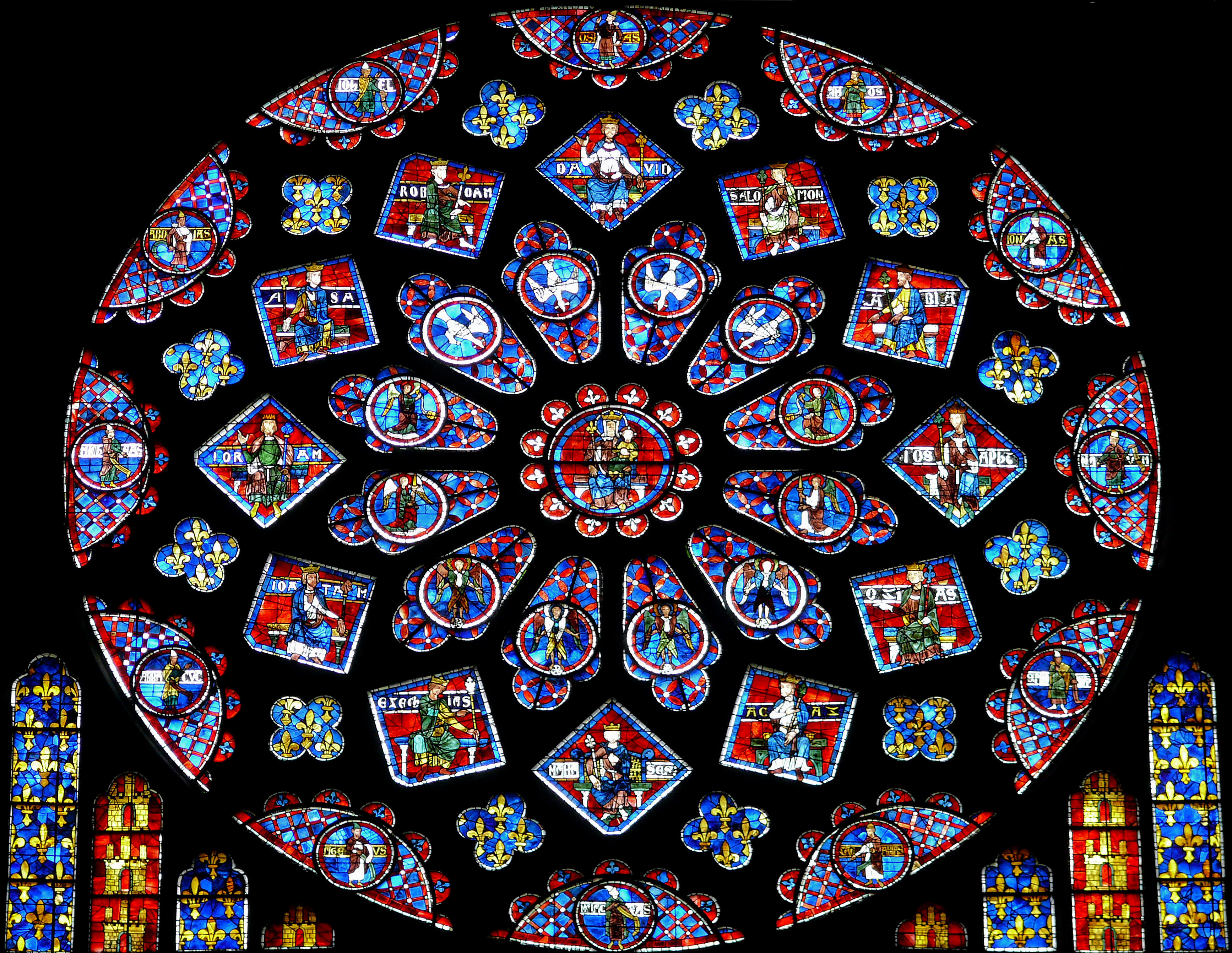 Cathédrale de Chartres - Transept Nord - Rose avec la Vierge Marie tenant l'Enfant Jésus en son centre et vitraux aux armes de France et de Castille